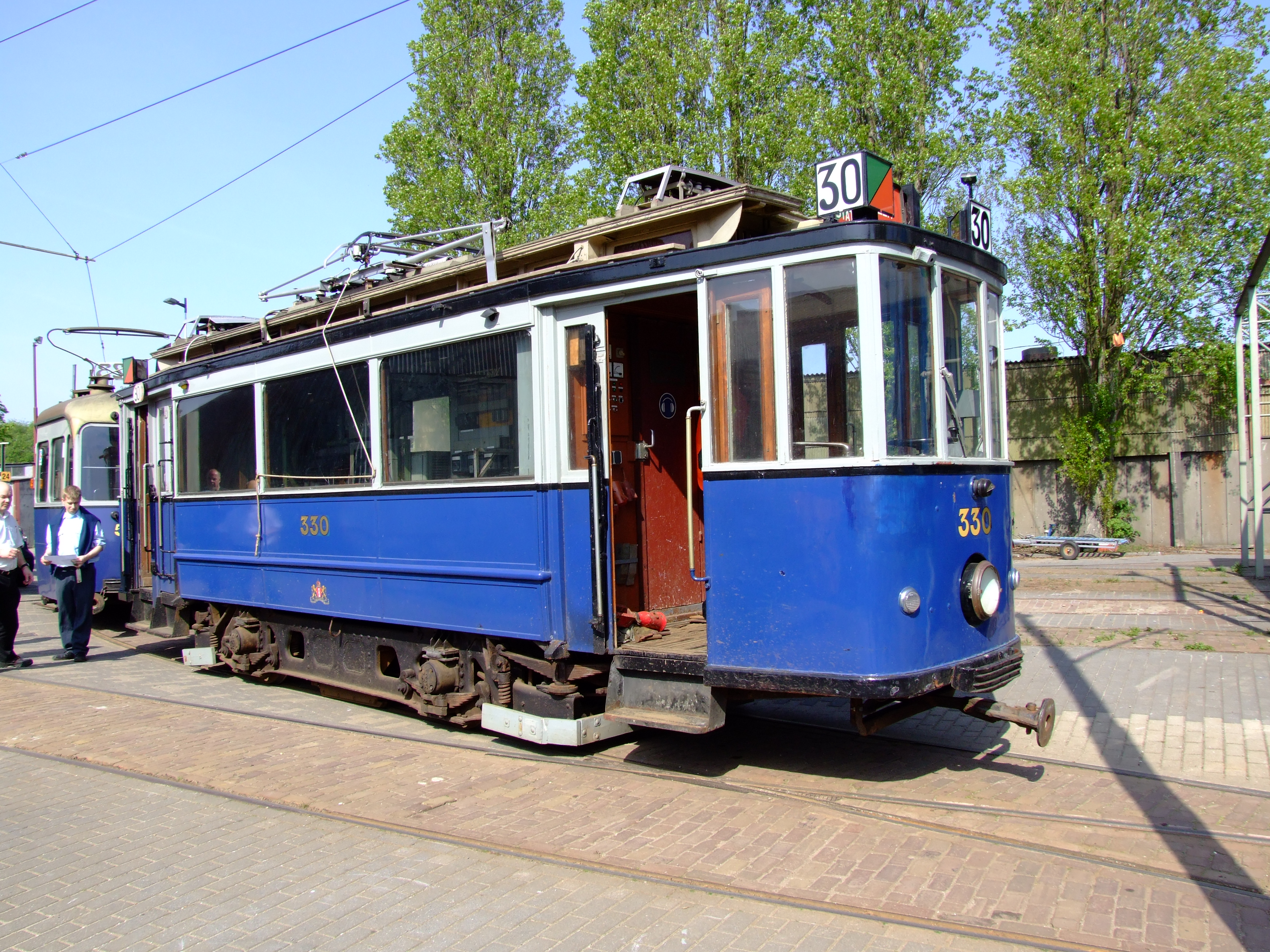 Part of the Electrische Museumtramlijn Amsterdam collection. Museum tram 330 Ouderkerk, Amstelveen, Haarlemmermeer.